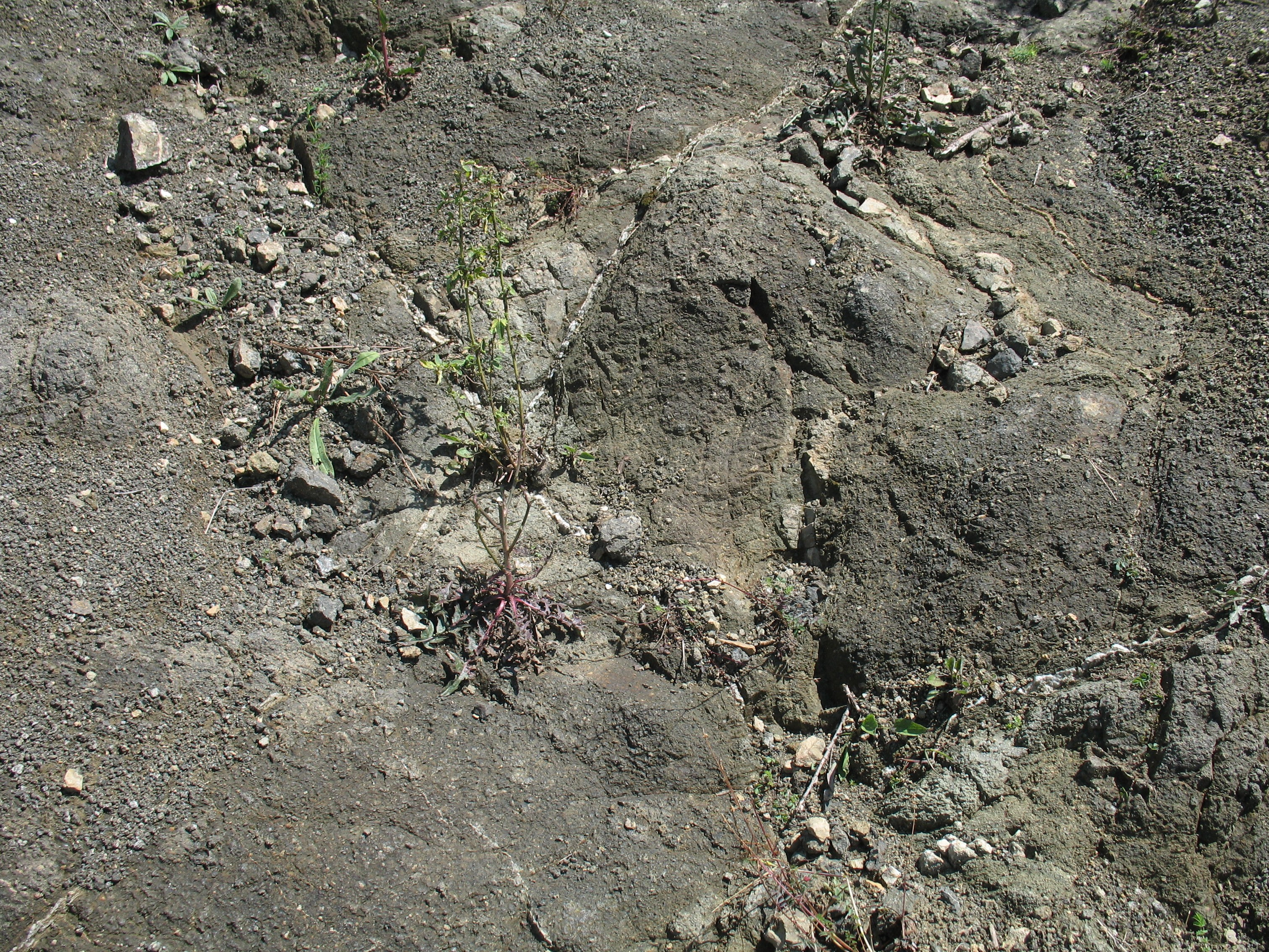 Sopečné horniny, protkané křemennými žilkami